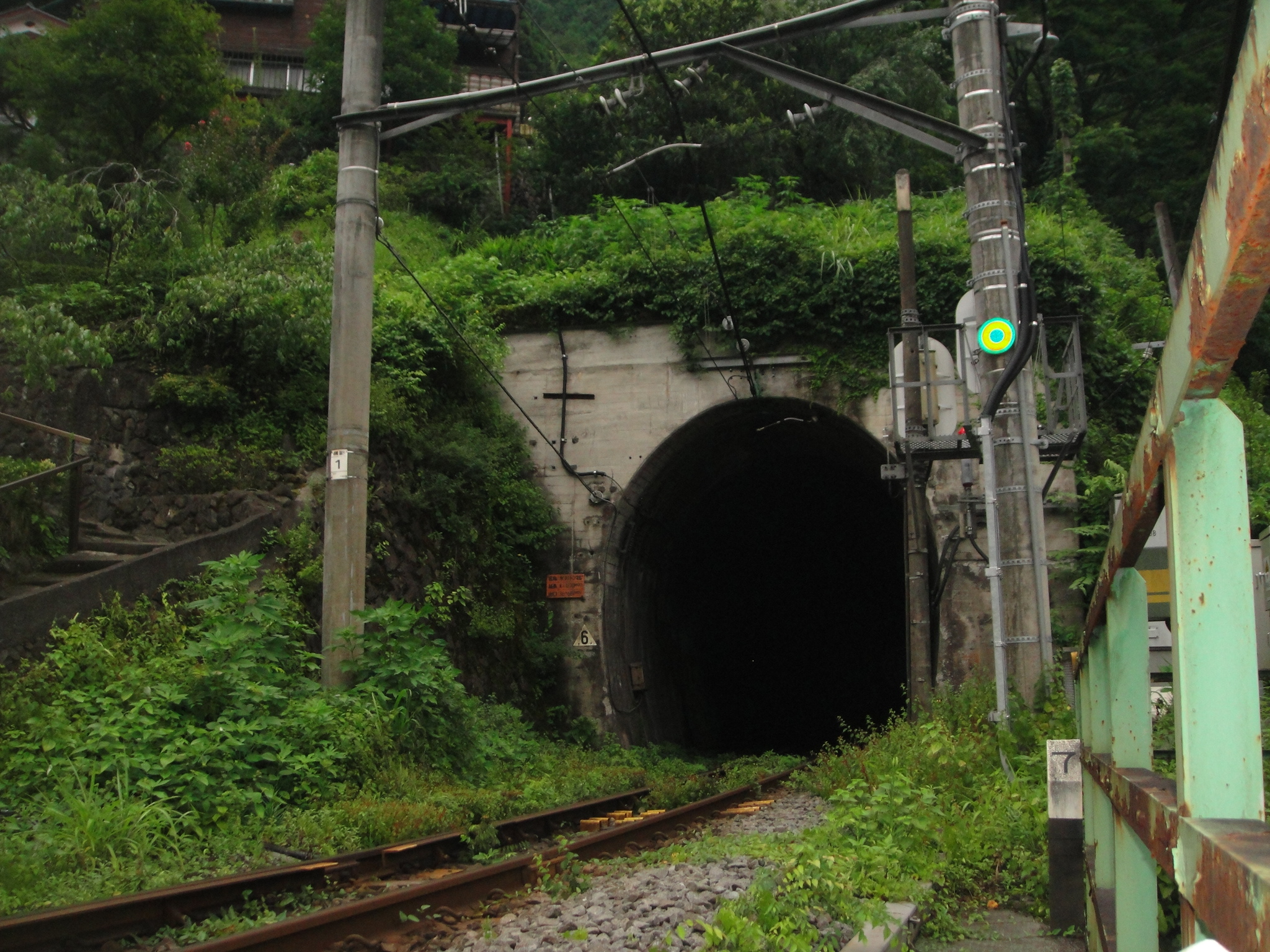 JR青梅線『氷川トンネル』